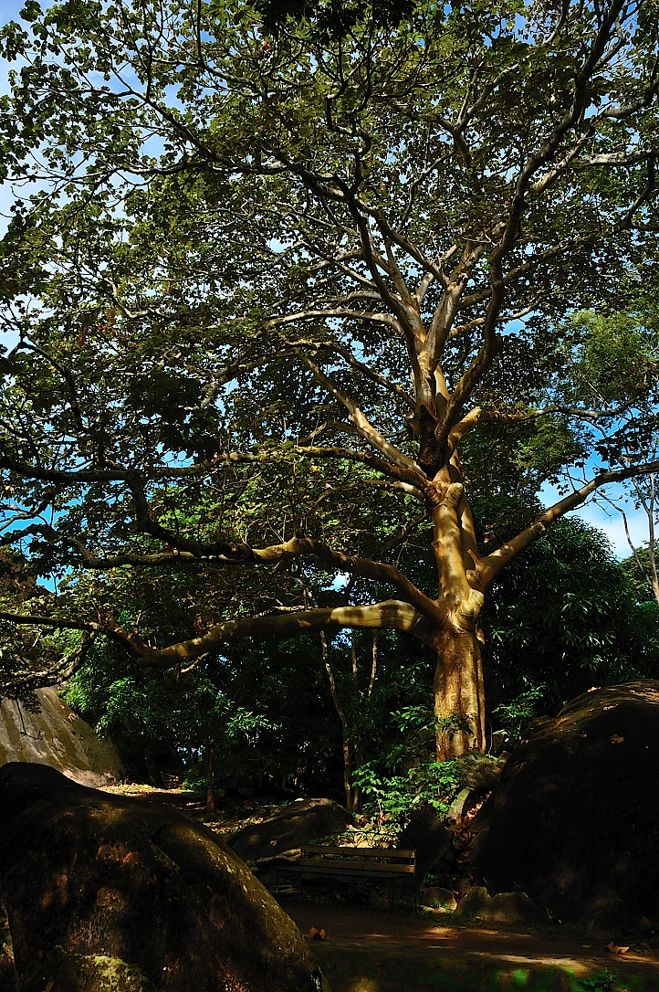 Árbol de Camoruco (Sterculia apetala). Castillos de Guayana. Municipio Casacoima. Estado Delta Amacuro. Venezuela.